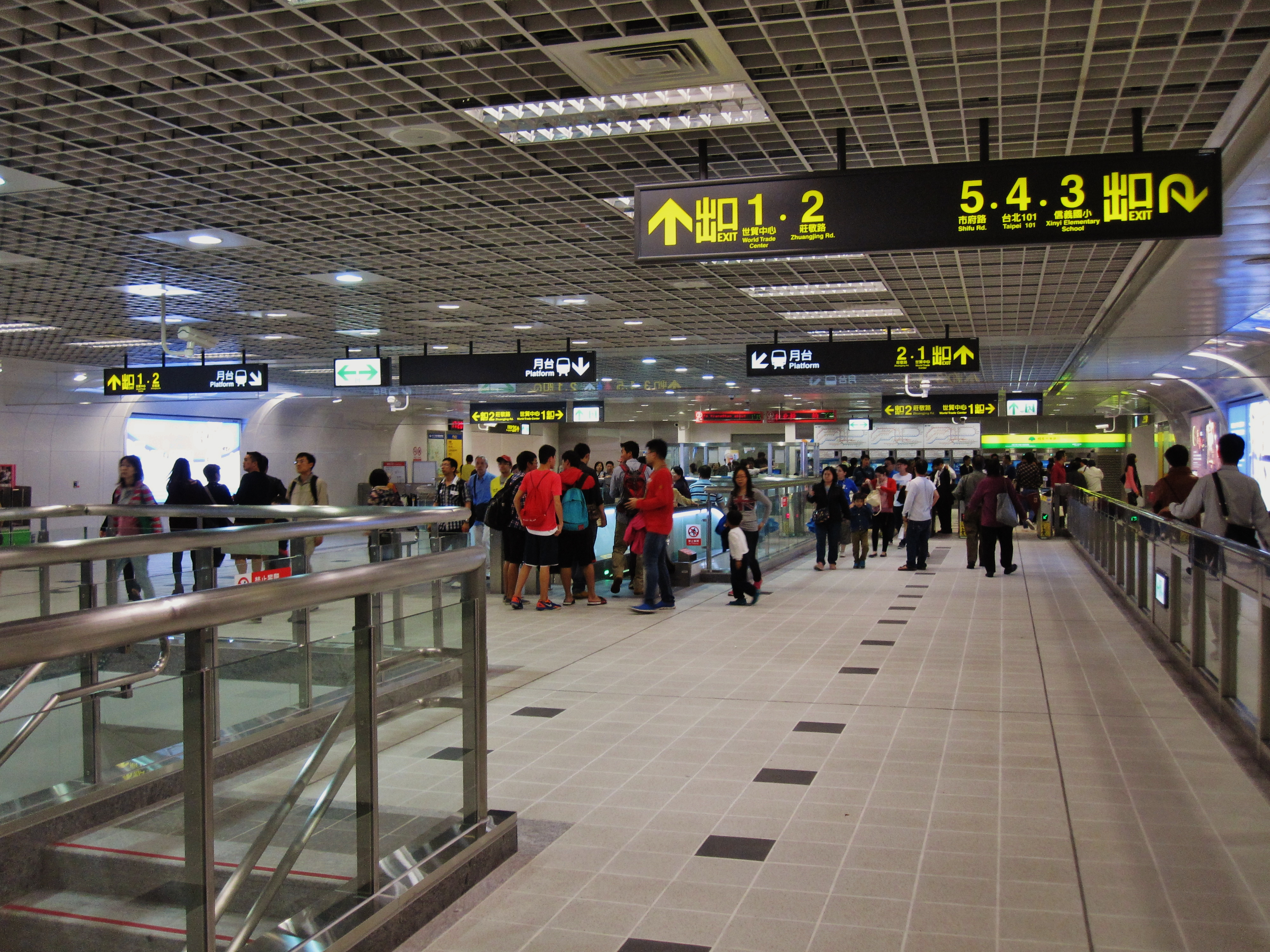 台北捷運信義線台北101/世貿站穿堂層。